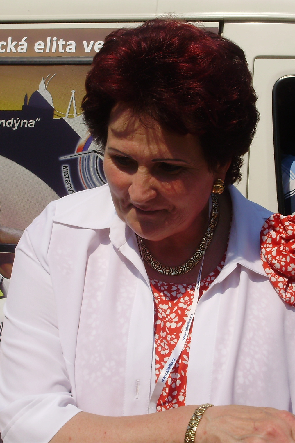 Helena Fibingerová Vyškov 2012